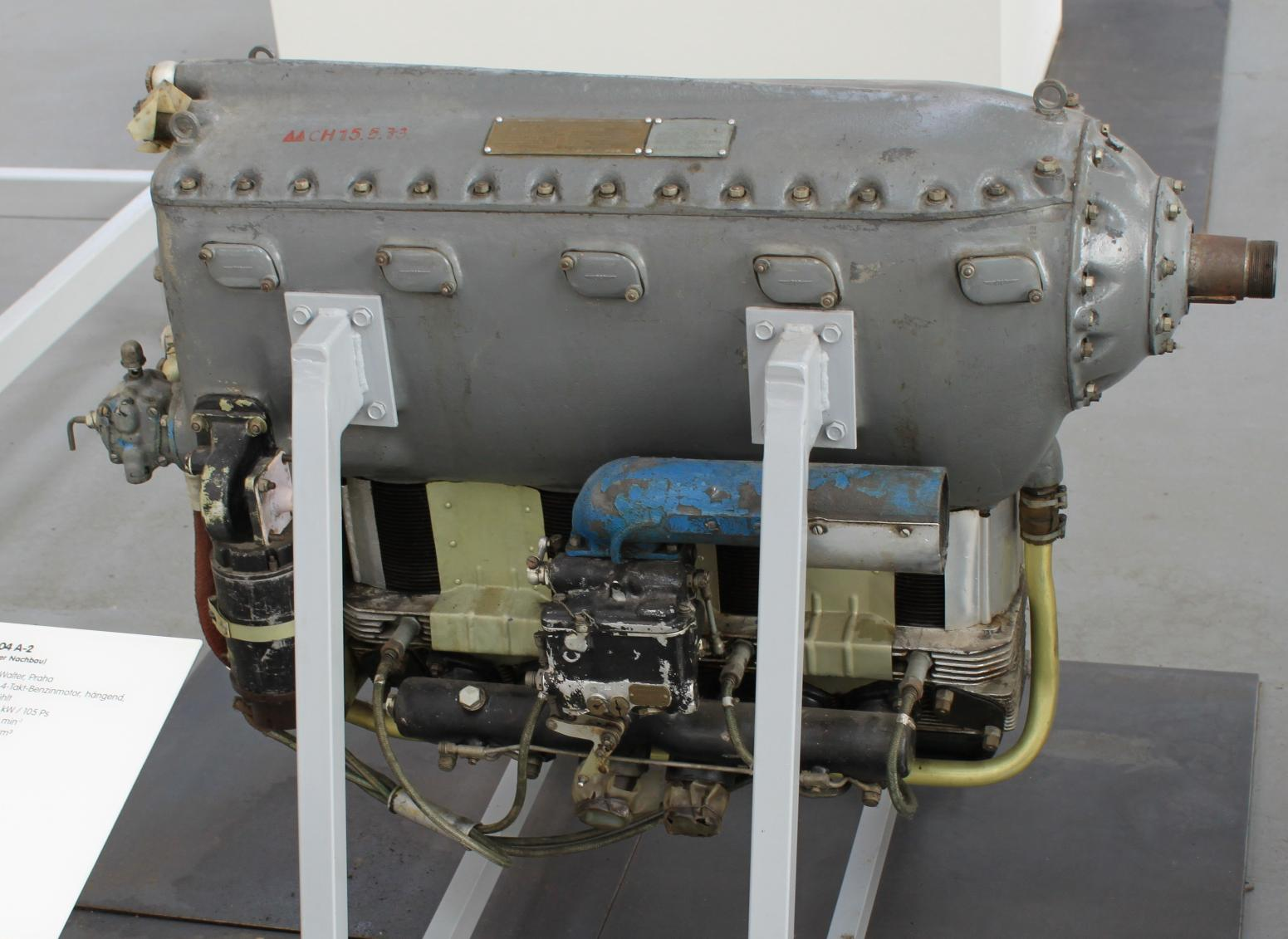 Flugzeugmotor Hirth HM-504-A2, als tschechischer Nachbau Walter Minor-4-III Aufgenommen im Technikmuseum Dessau